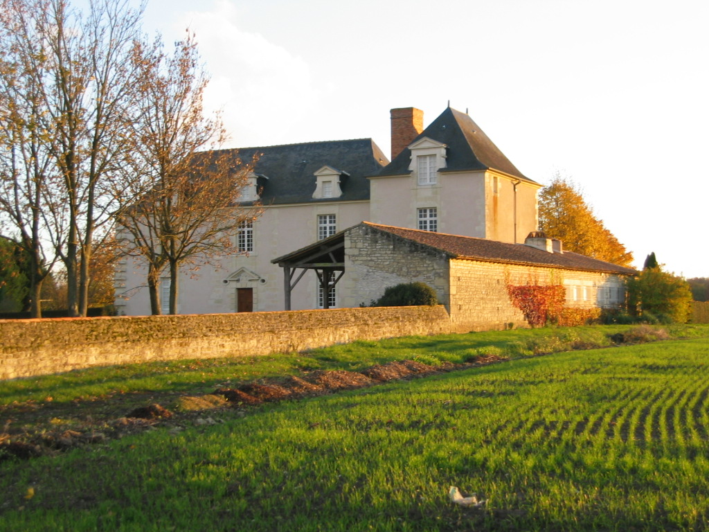 Château de Baugé (79)